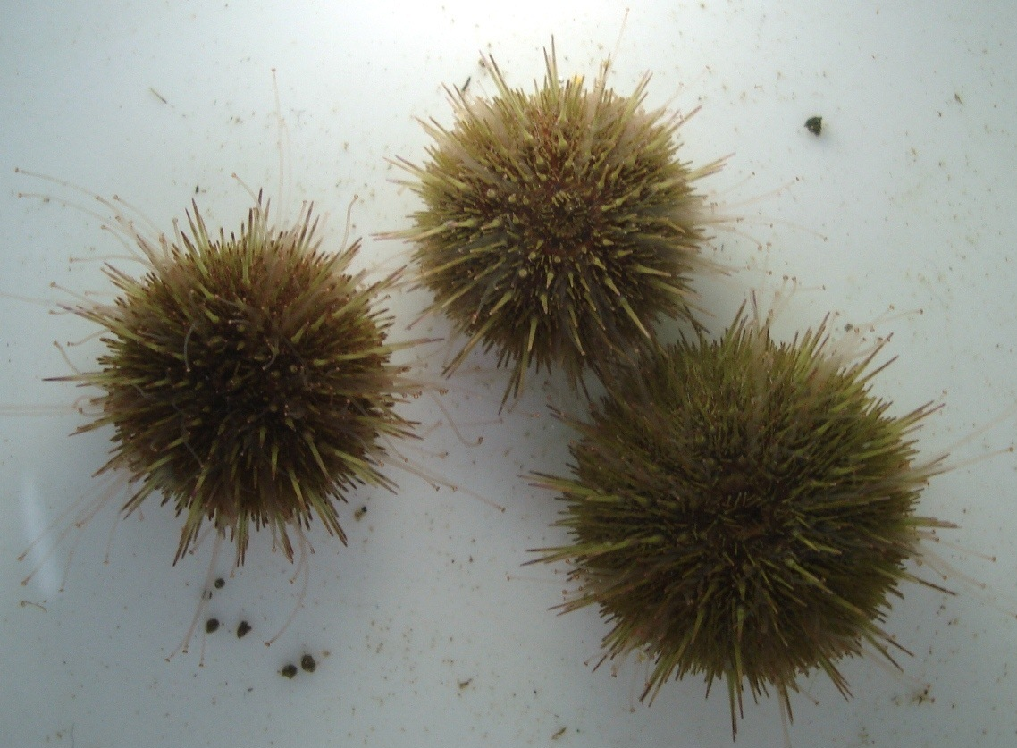 Psammechinus miliaris - Green urchin - Strandseeigel